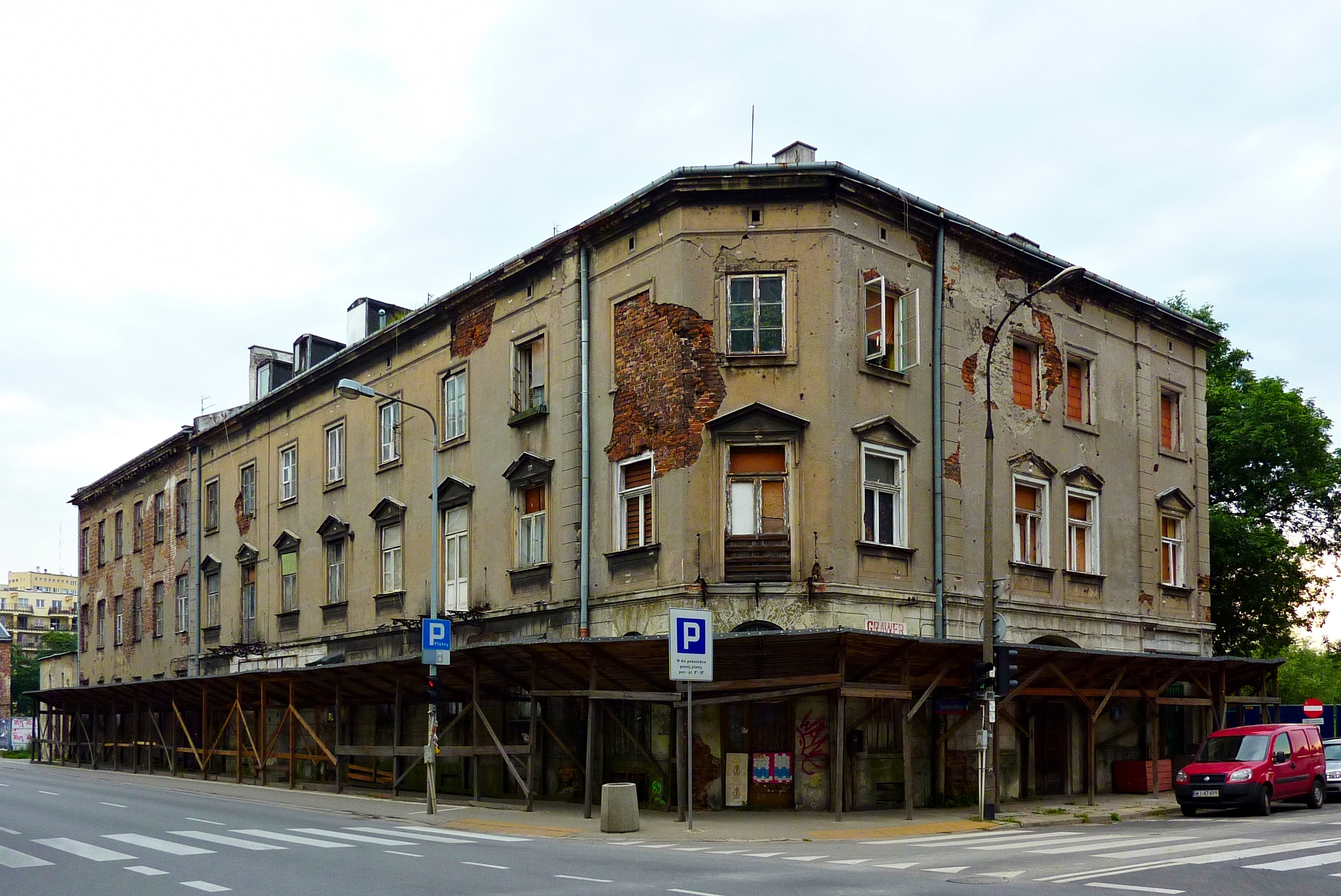 Warszawa, ul. Sierakowskiego 4 – dom Karola Mintera, 1860-63, 1897 (zabytek dec. 137/11 z 14.02.2011).